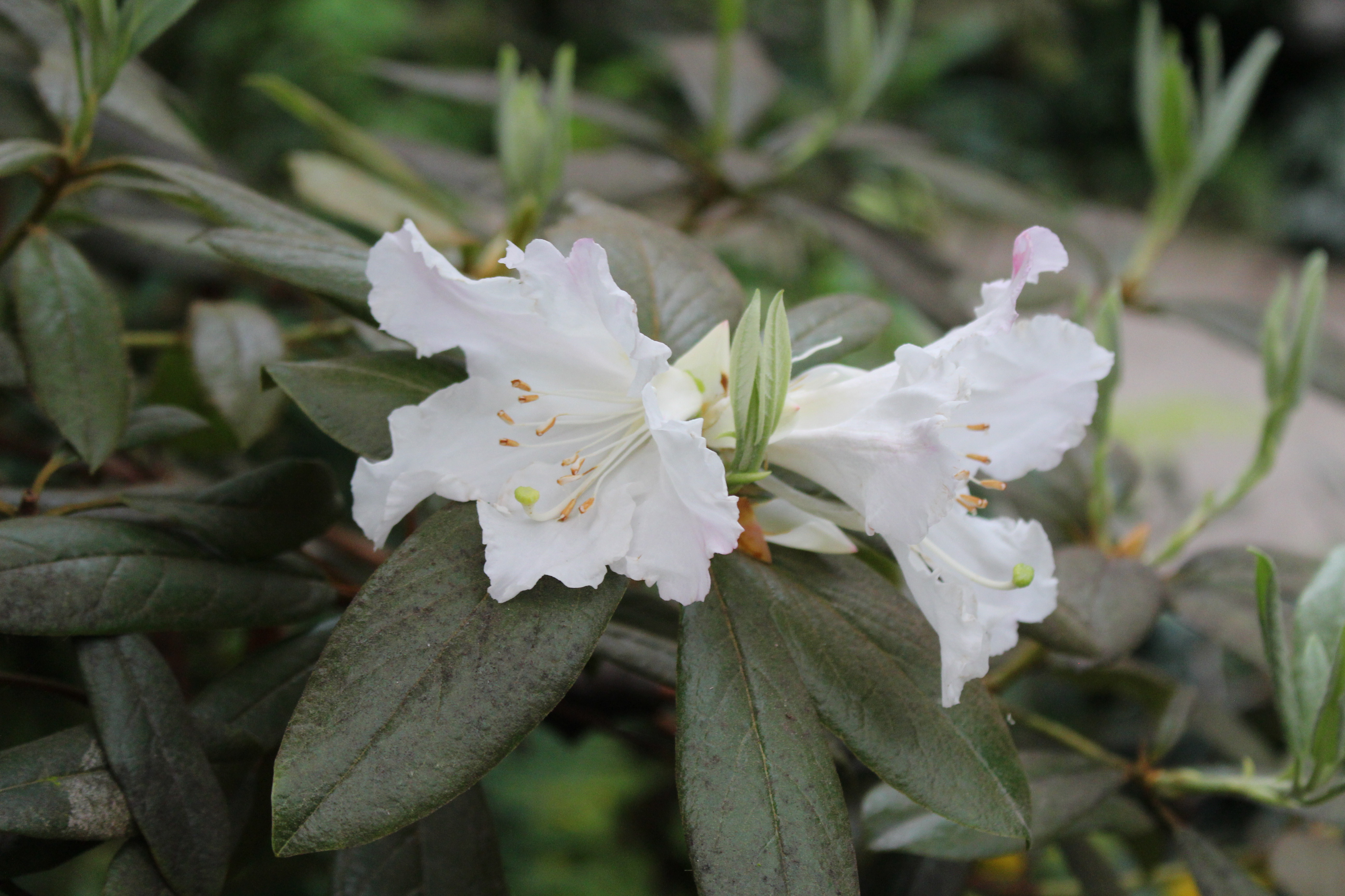 Rhododendron ludwigianum i 'Botanika', Bremen, Tyskland